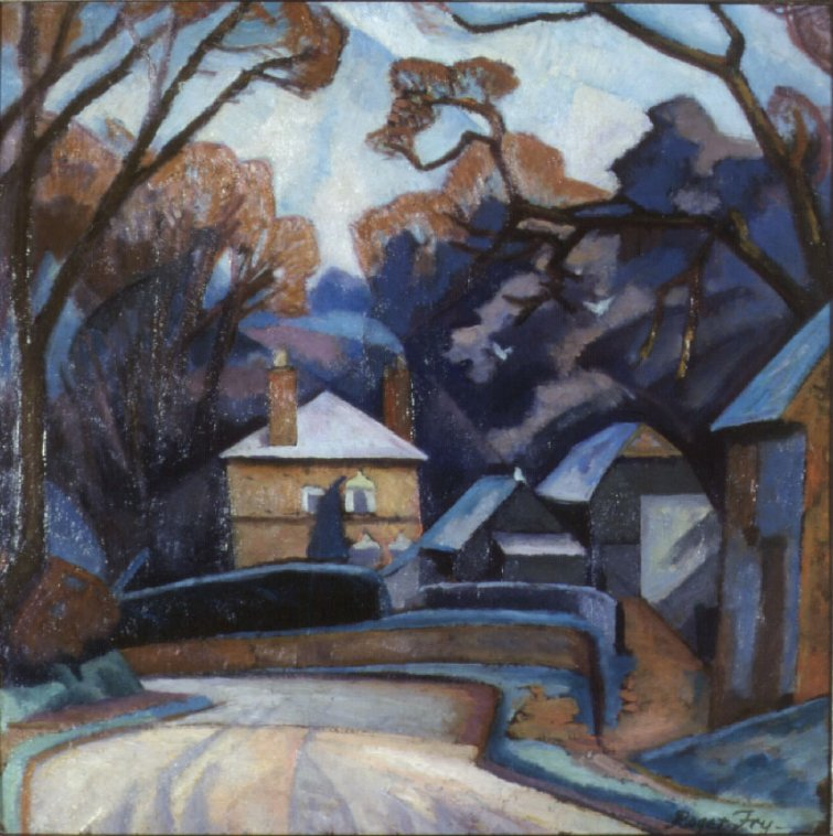 “Paisaje de invierno” 20 × 20 inches